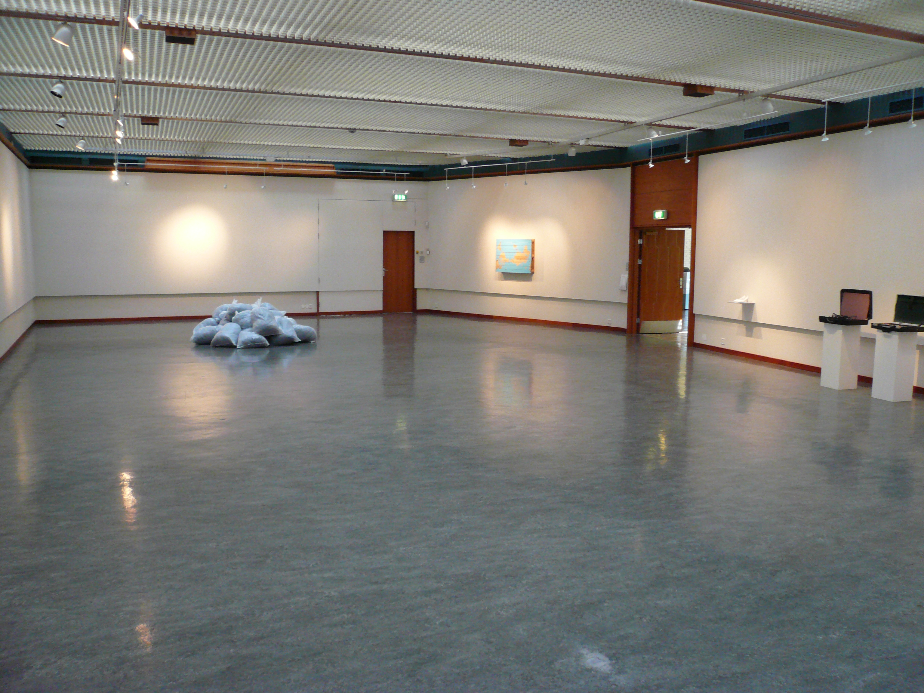 Haugesund Billedgalleri, interiør